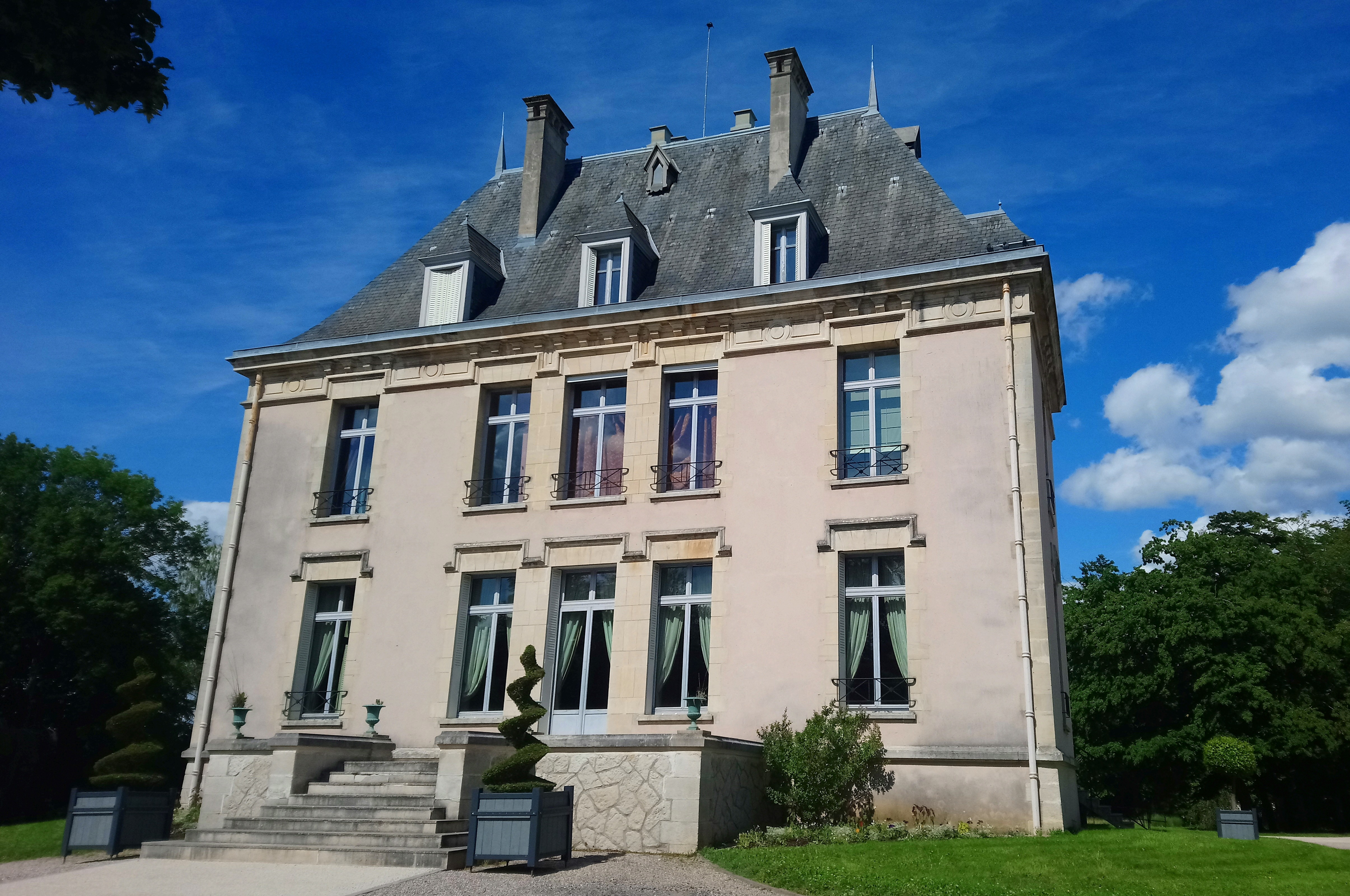 Façade du Château du Charmois en juin 2020